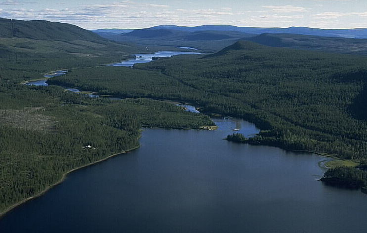 Utloppet mot Stavsjön. Motiv: Vikarsjön Nyckelord: Flygbilder, Riksintressen Kategori: Insjömiljöer, SkogslandskapUtloppet mot Stavsjön.